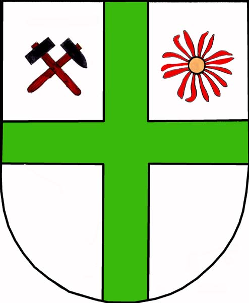 Znak obce Lomnice (okres Bruntál)